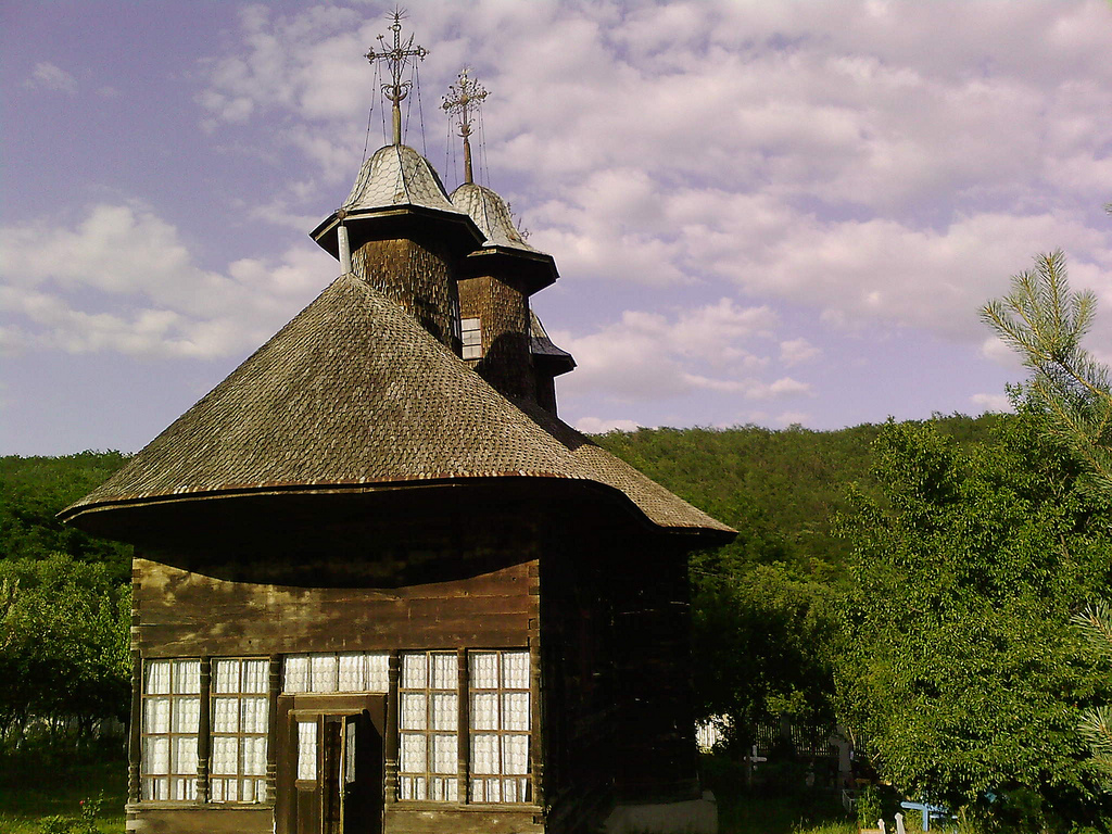 În centrul satului Pârveşti; comuna Costeşti